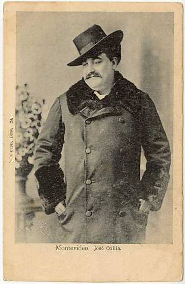 Carte de visite de José Oxilia.